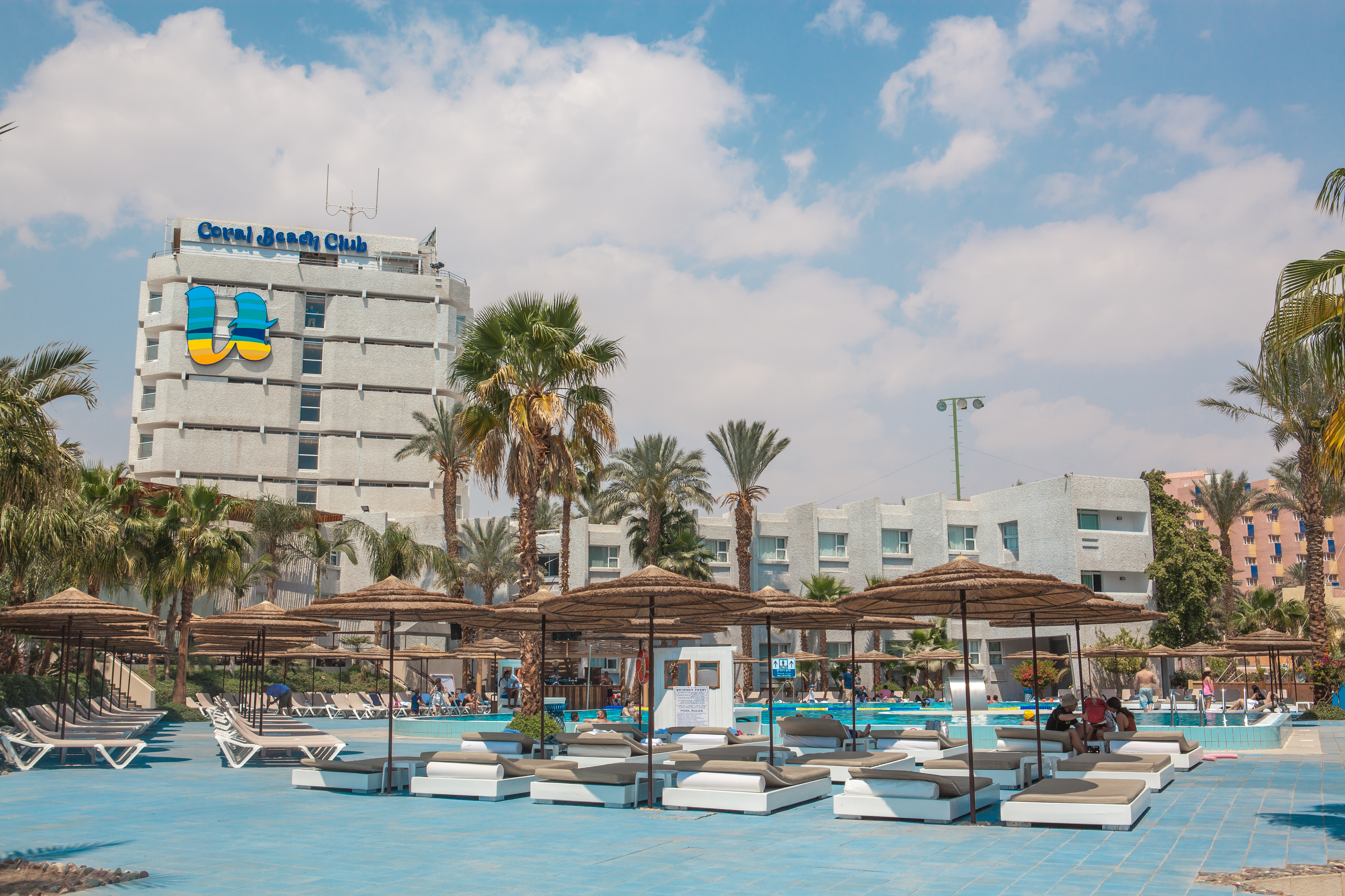 מלון יו קורל ביץ' קלאב באילת